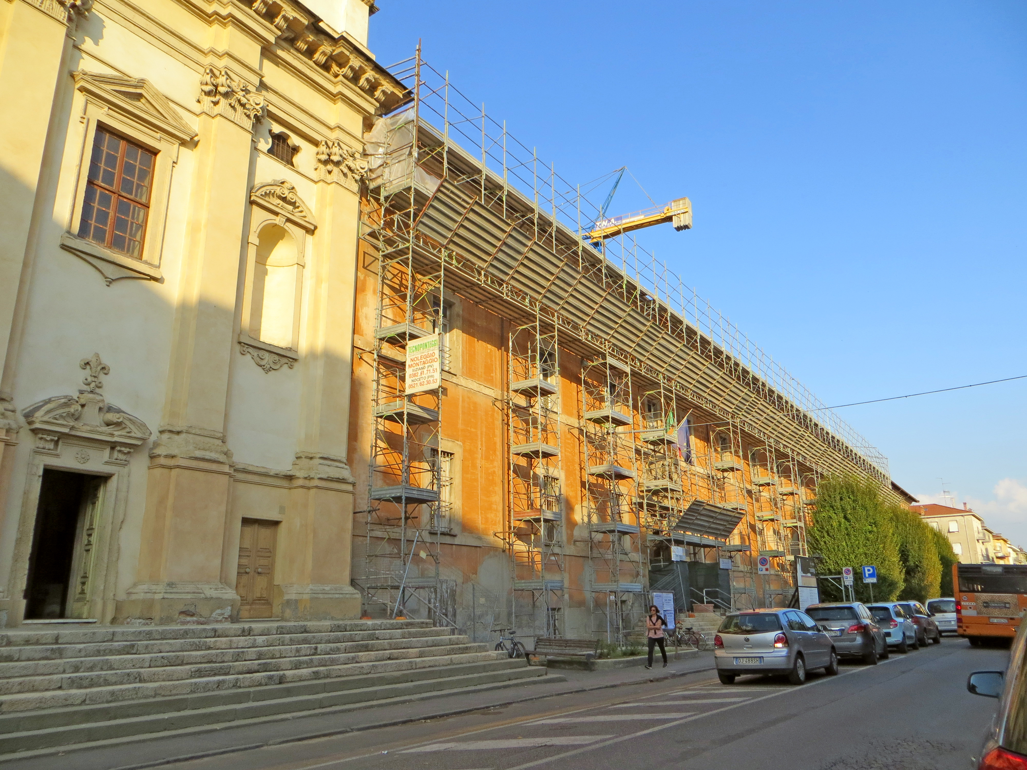 Collegio dei Gesuiti (Fidenza) - facciata